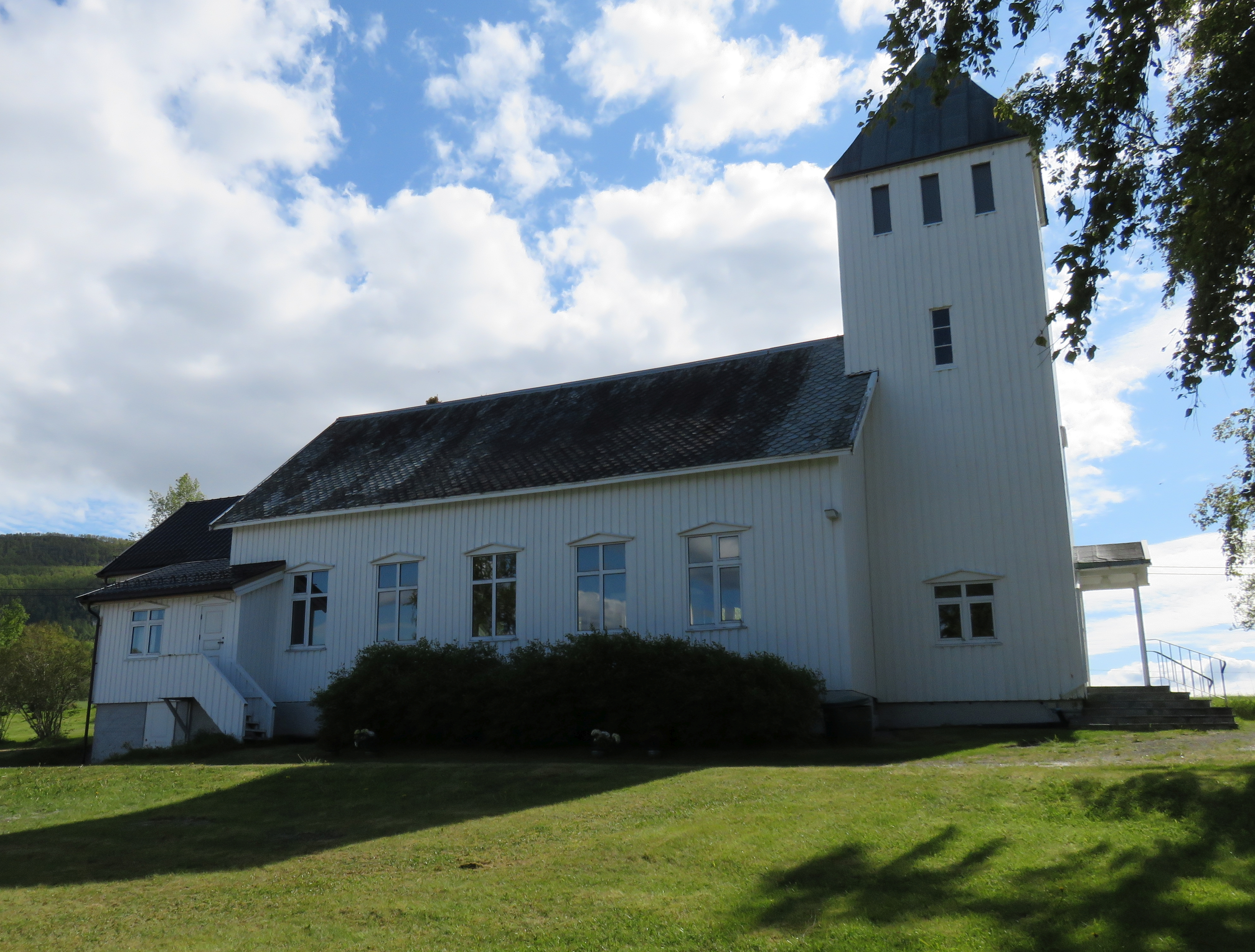 Kjeldebotn kirke